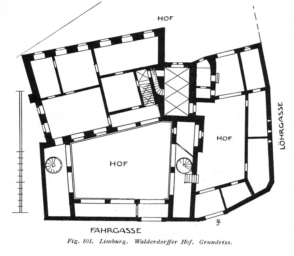 Grundriss des Walderdorffer Hofs in Limburg. Aus: Die Bau- und Kunstdenkmäler des Lahngebietes. Oberlahn, Kreis Limburg Unterlahnkreis, Frankfurt/Main 1907, S. 123